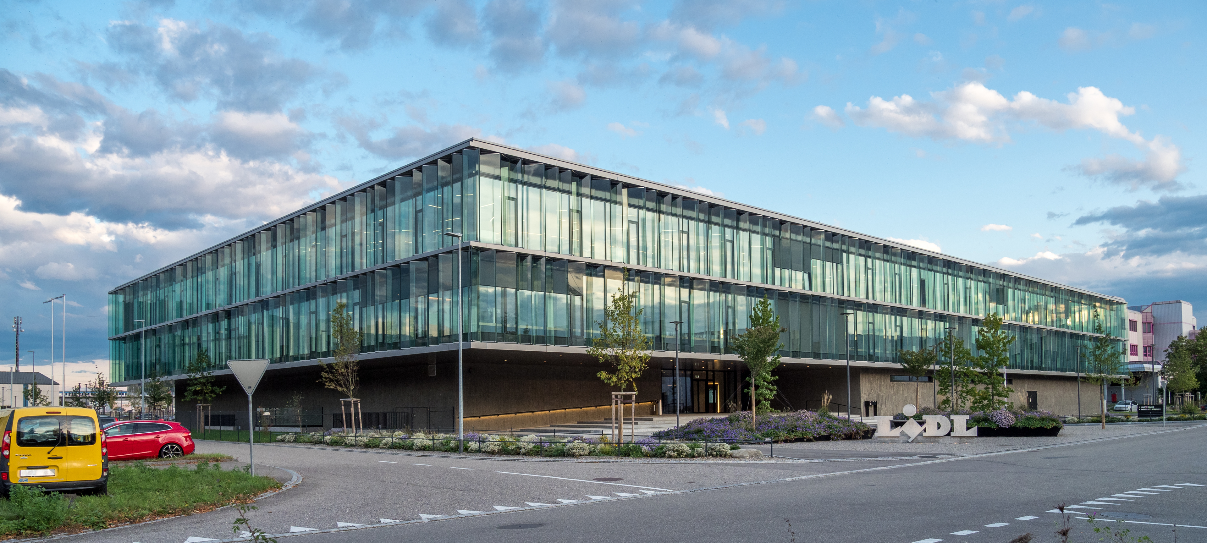 Lidl Schweiz, Firmenzentrale in Weinfelden, Kanton Thurgau